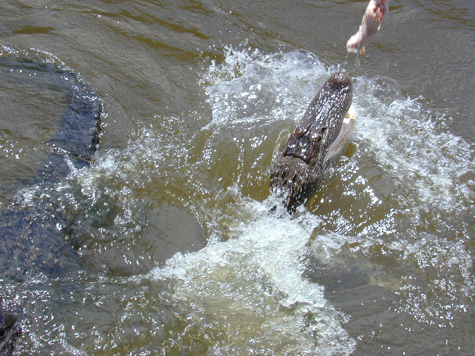 Alligator mississippiensis, feeding frenzy